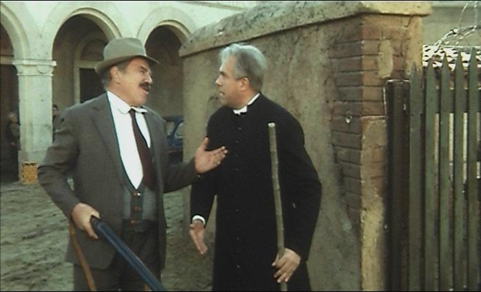 Creato e caricato da me medesimo sulla base del film "Don Camillo e i giovani d'oggi" datato 1972.